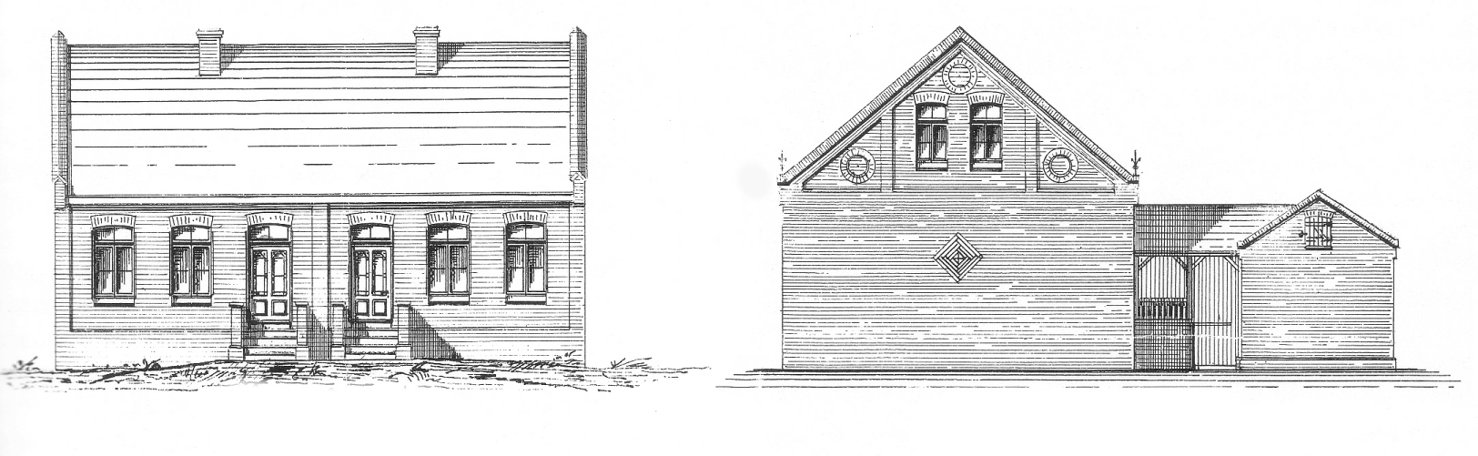 Plan für ein Arbeiterwohnhaus im Döhrener Jammer, Vorder- und Seitenansicht